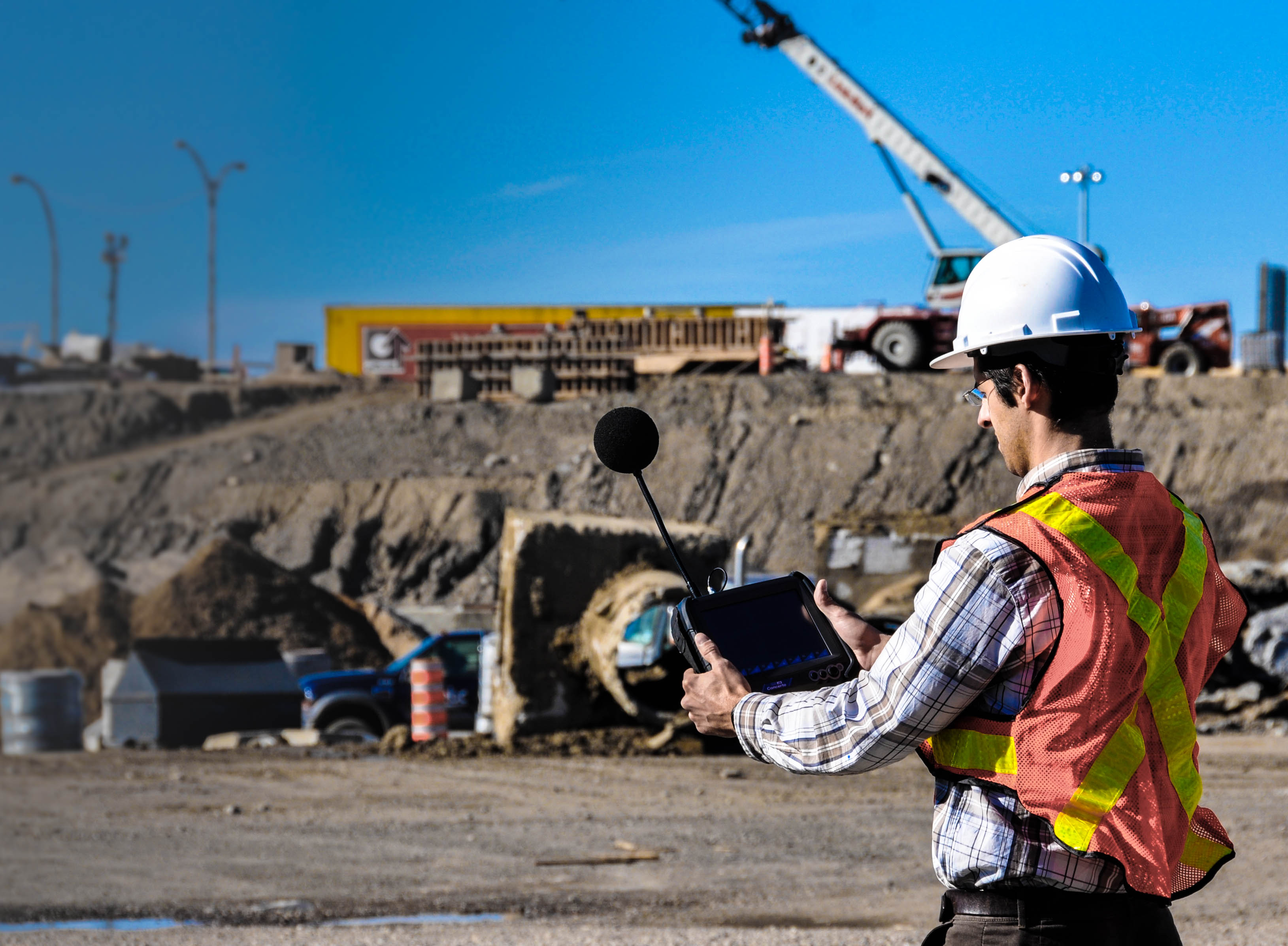 Ingénieur acousticien